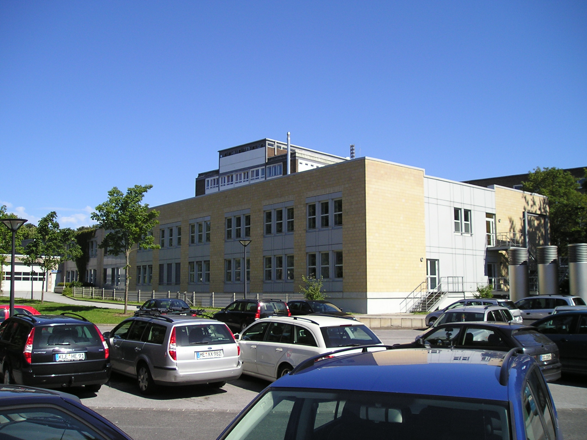 Krankenhaus Benrath